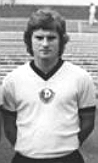 Title: Mannschaftsfoto SG Dynamo Dresden Factual corrections and alternative descriptions are encouraged separately from the original description. Additionally errors can be reported at this page to inform the Bundesarchiv. Original historic description: ADN-ZB-Häßler-1.9.76-str-Dresden: DDR-Fußball-Meister SG Dynamo Dresden wird die Aufgaben der Saison 1976-77 in folgender Besetzung in Angriff nehmen. Obere Reihe v.l.: Matthias Müller, Christian Helm, Matthias Donix, Udo Schmuck, Hans-Jürgen Kreische, Hartmut Schade, Gerd Weber, Hans-Jürgen Dörner und Klaus Müller. Untere Reihe v.l.: Gerd Heidler, Reinhard Häfner, Peter Kotte, Klaus Boden, Jörg Klimpel, Frank Richter, Rainer Sachse und Dieter Riedel.